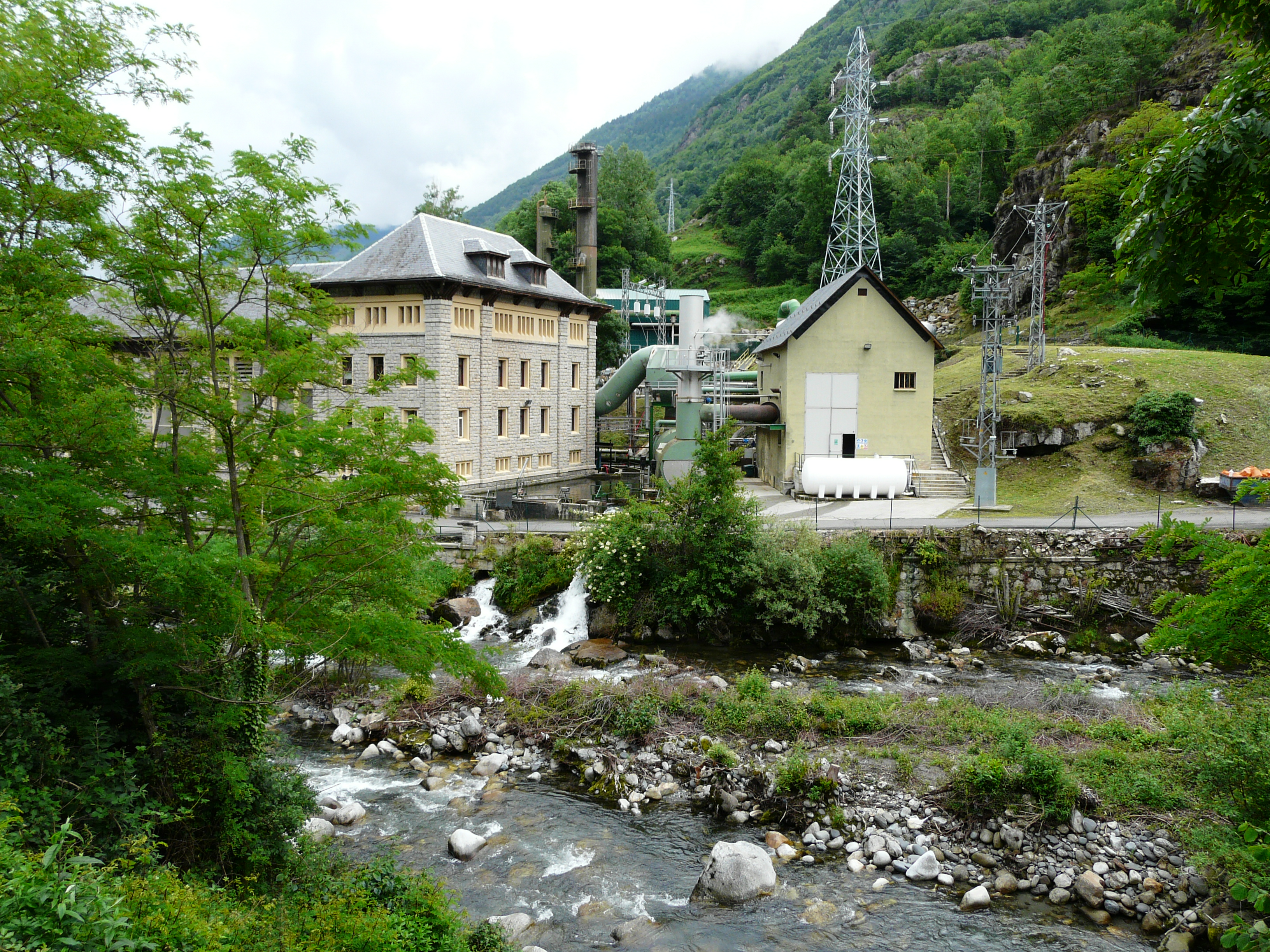 La centrale hydroélectrique de Cledes sur la Garonne, Les, Val d'Aran, Catalogne, Espagne.